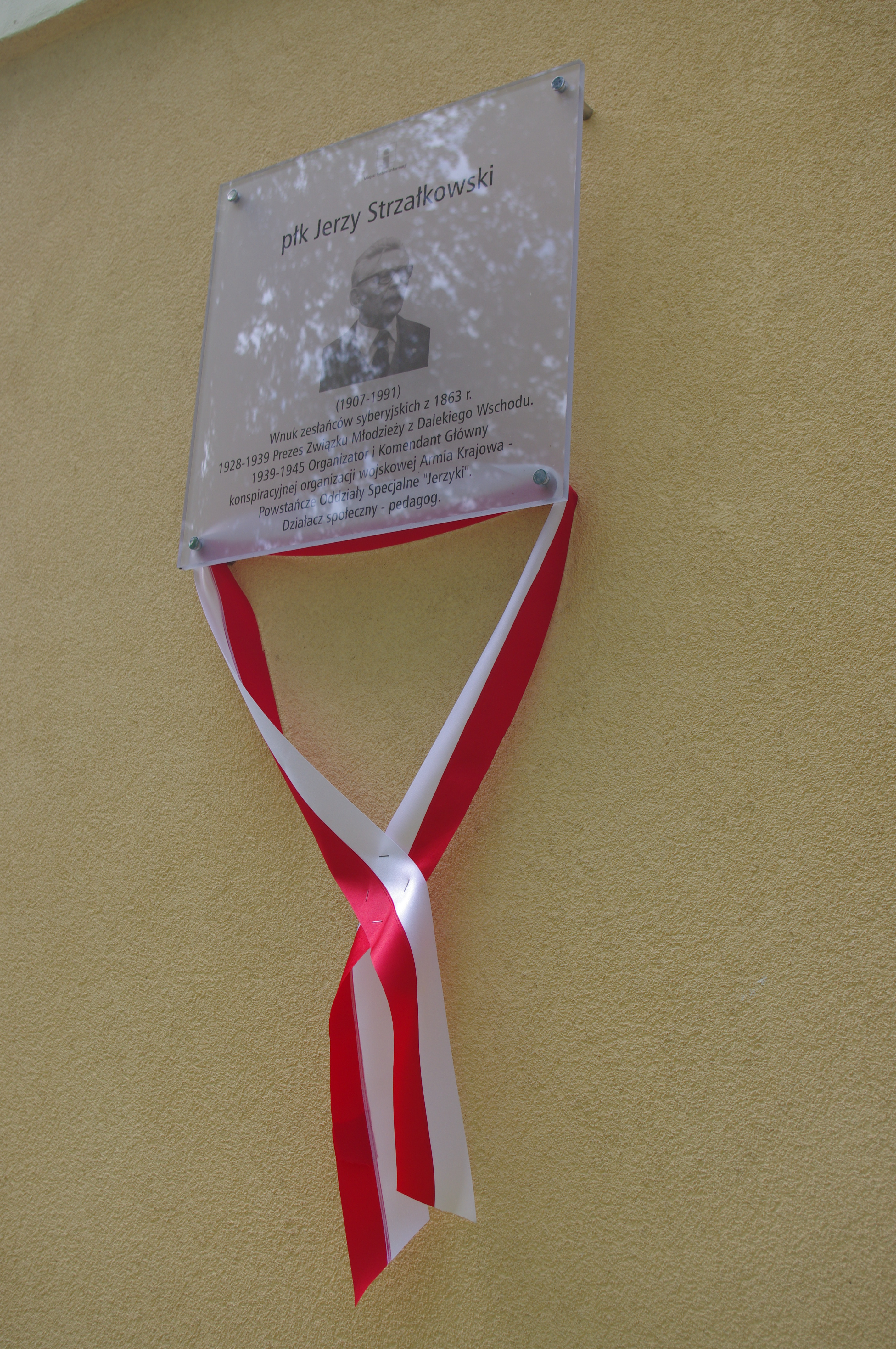 Tablica upamiętniająca Jerzego Strzałkowskiego w Alei spacerowej (ciąg pieszy - alei topolowej) im. Pułk. Jerzego Strzałkowskiego na warszawskiej Woli pomiędzy ulicami Nowolipie i Nowolipki